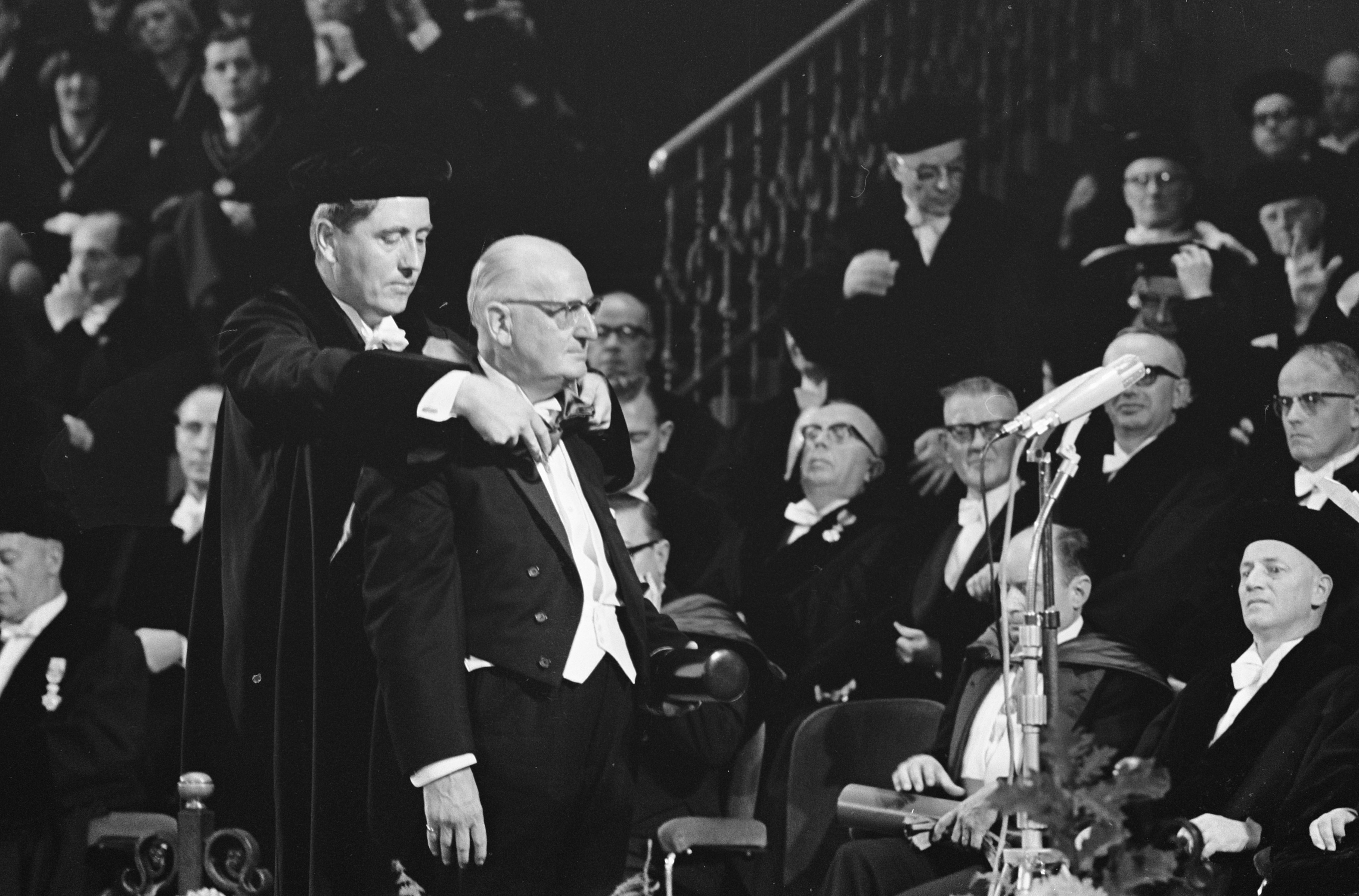 Uitreiking eredoctoraten van de Vrije Universiteit in het Concertgebouw te Amsterdam, 20 oktober 1965 Een van de ontvangers van een eredoctoraat, Cornelis Rijnsdorp, krijgt de ere-cappa omgehangen